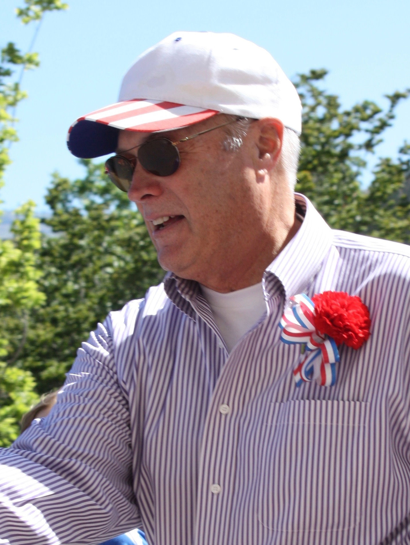 Oregon State Senator Dr. Alan Bates